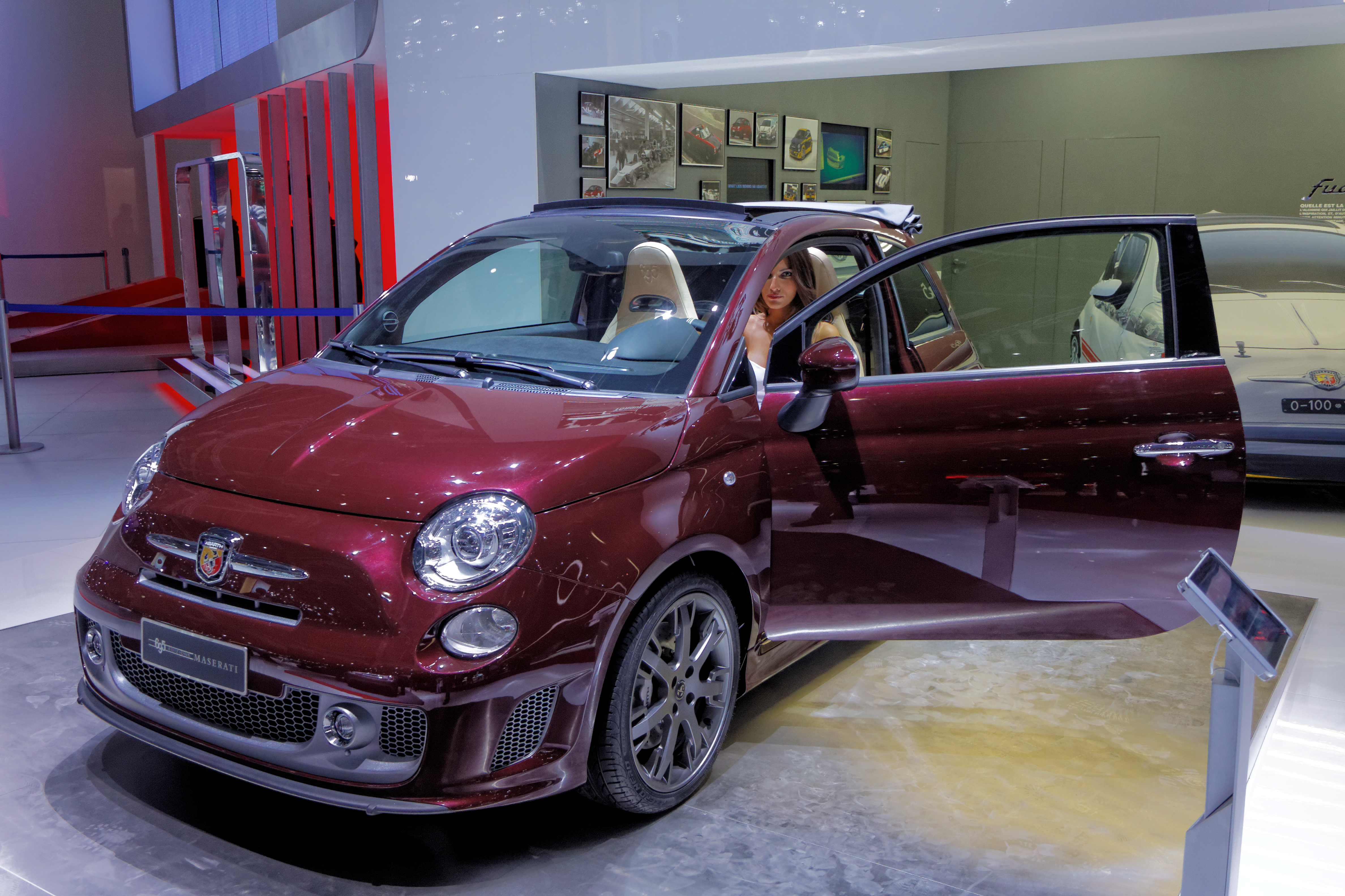 Une Fiat Abarth 695 Edizione Maserati présentée lors du Mondial de l'Automobile de Paris 2012.